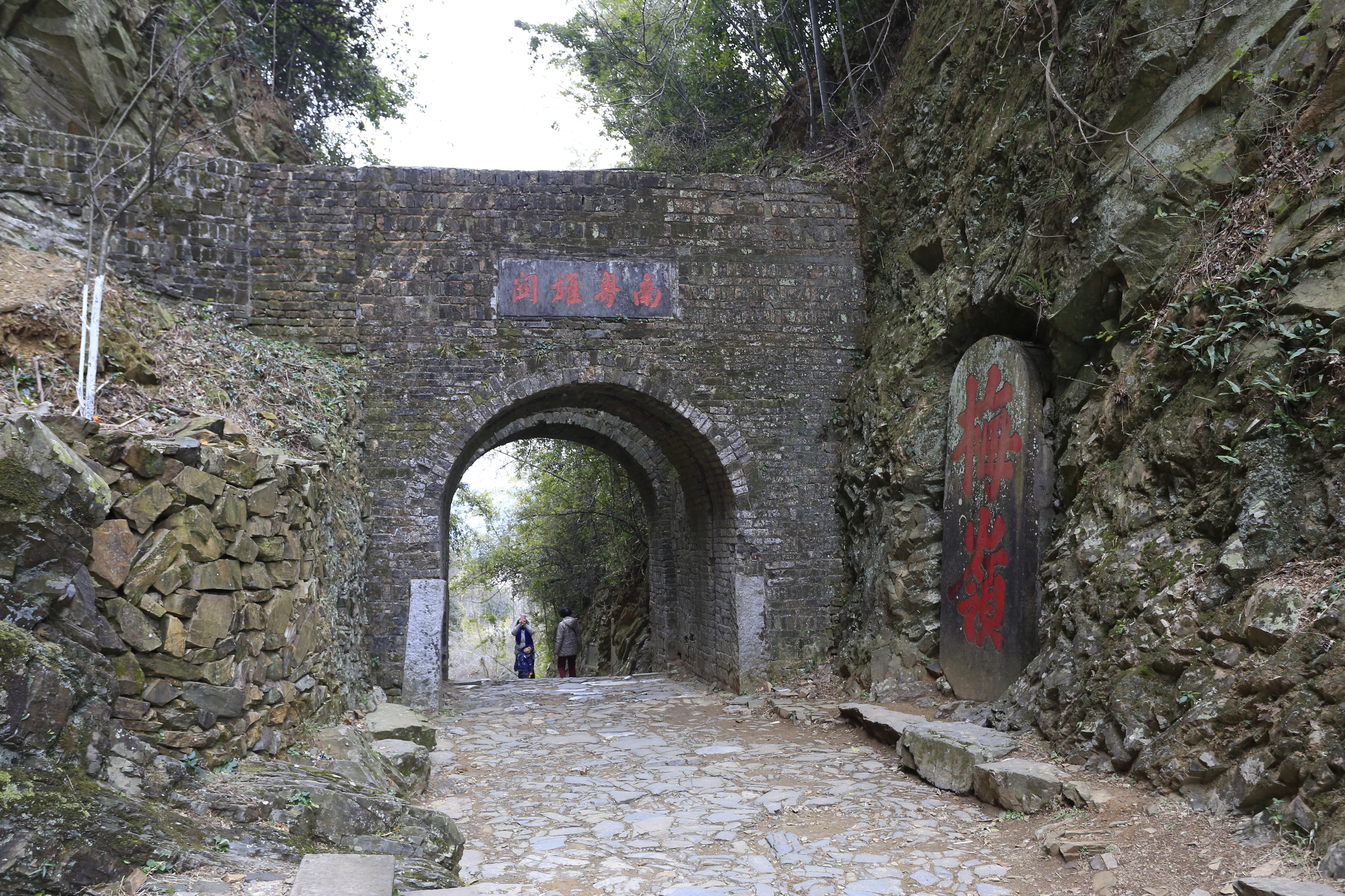 梅關